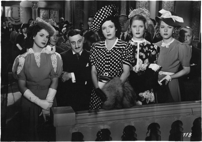 Delia Garcés, Enrique Serrano, Sofía Bozán, Ana May y Mary Dormal en una foto fija del film Muchachas que estudian (1939).